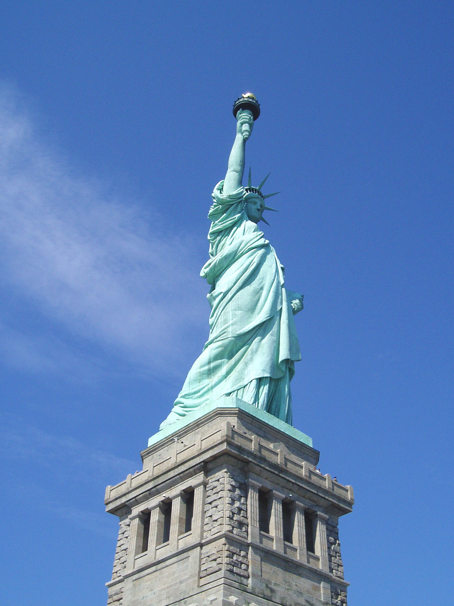 Statue de la liberté